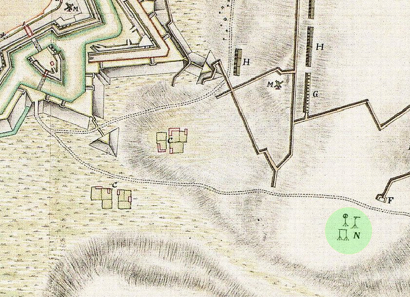 Plan der Belagerung und Einnahme von Stade durch den dänischen König, 7. August bis 29. September 1714, rechts grün markiert Richtstätte Hohestor